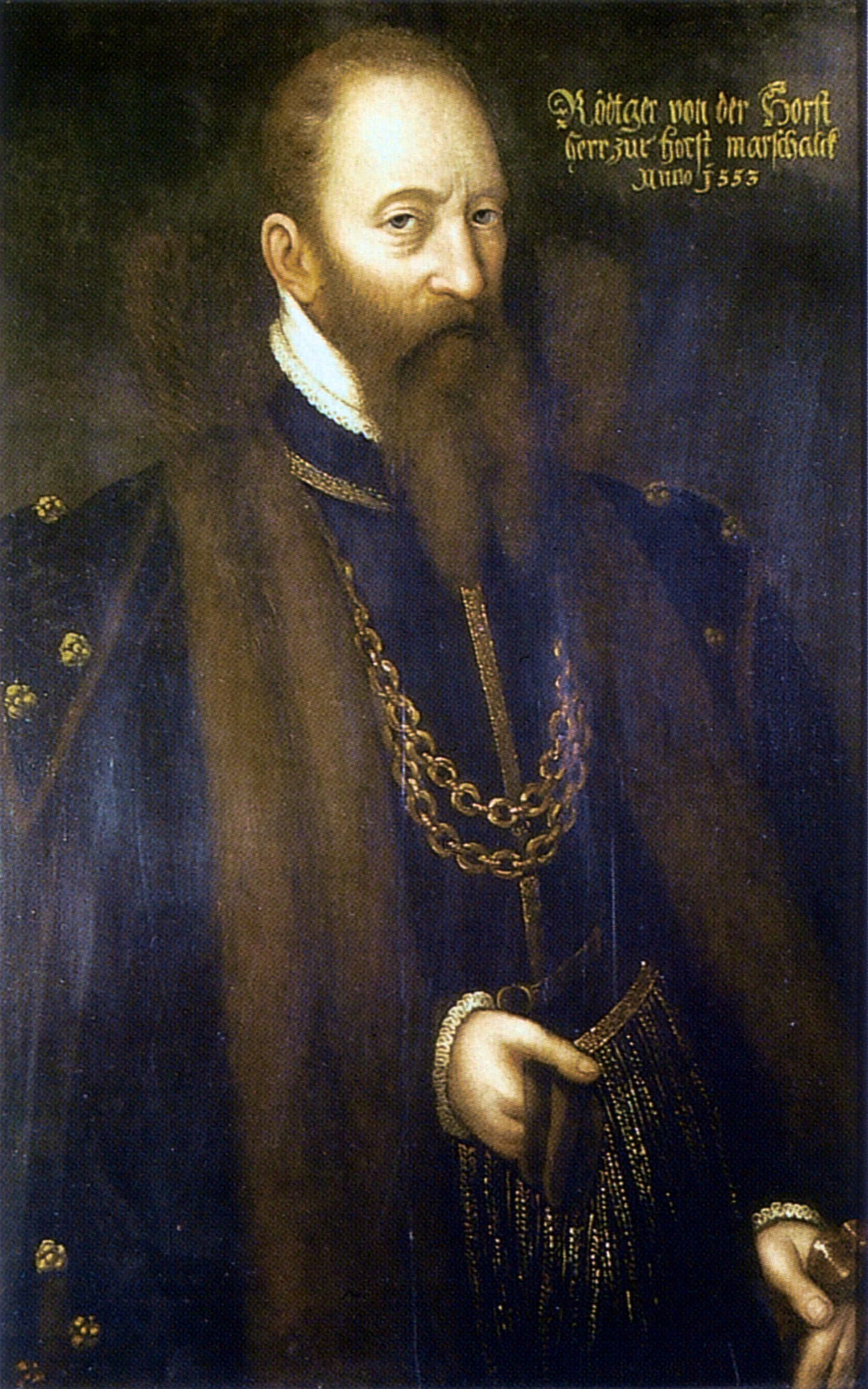 Porträt Rütger von der Horsts; Museum Renaissance-Schloss Horst, Öl auf Leinwand